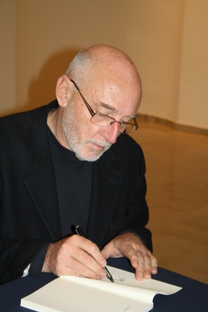 Bari, 2/12/2011: l'Università degli studi di Bari “Aldo Moro” ha ospitato la presentazione del libro "Il bene ostinato" di Paolo Rumiz. In questa foto l'autore firma alcune copie del libro.